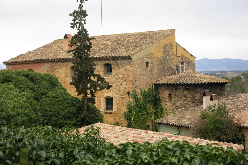 castell de Rocamora a Montferri, comarca de l'Alt Camp - Catalunya